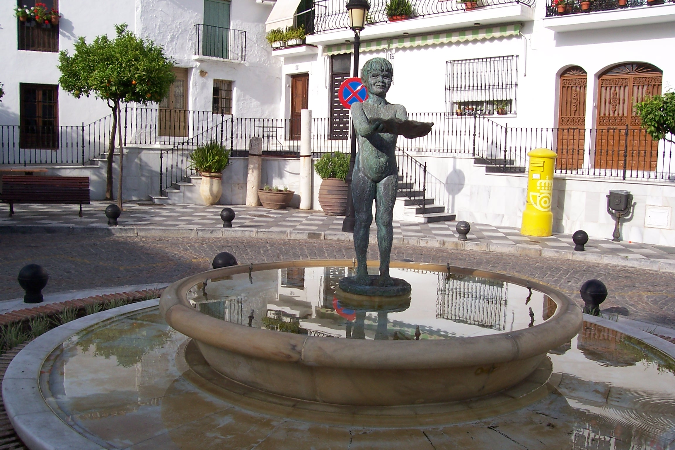 La Niña de Benalmádena. Plaza de España